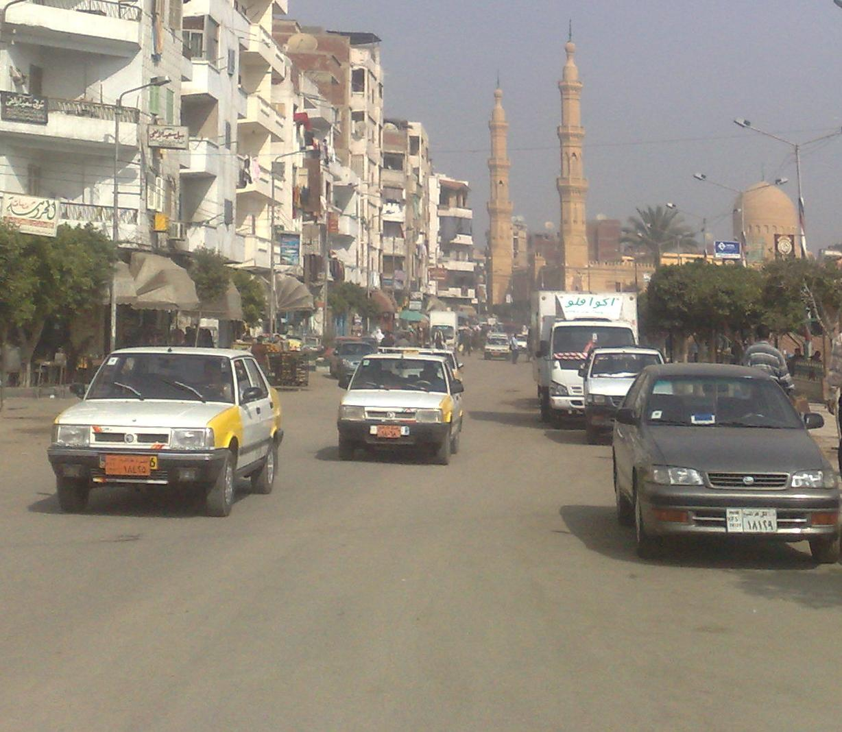 سيارات أجرة بدسوق